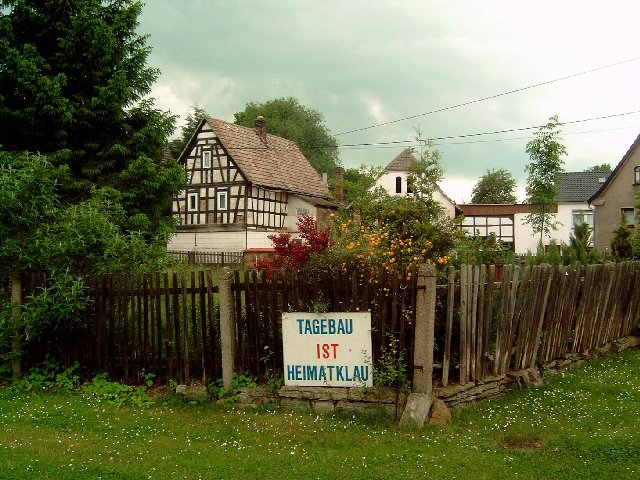 Idylle und Protest in Heuersdorf, Schild „Tagebau ist Heimatklau“